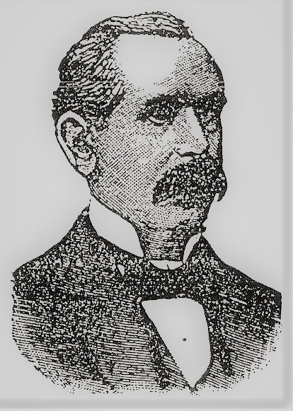 picture of Mícheál Ó Lóchain